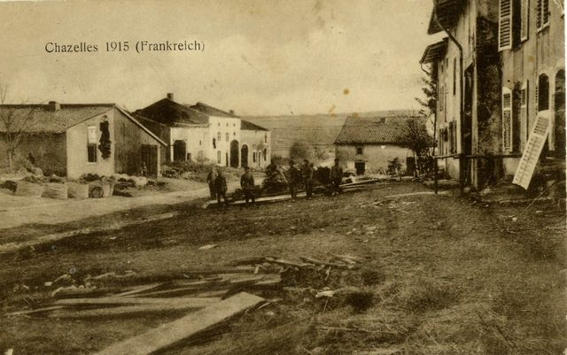 chazelles sur albes en 1915